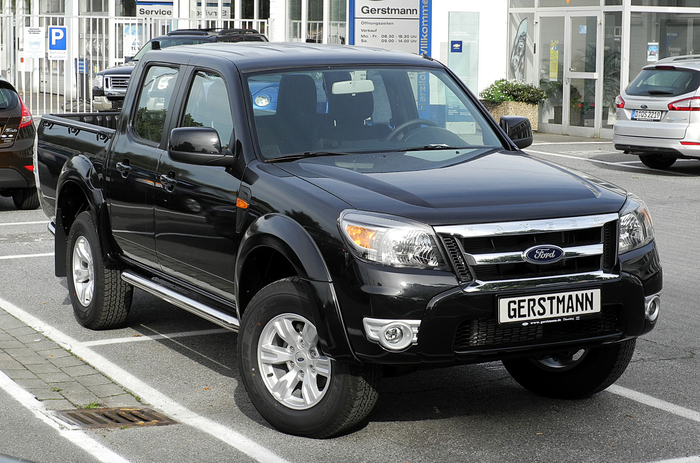 Ford Ranger XLT 2.5 TDCi Doppelkabine (II, Facelift)